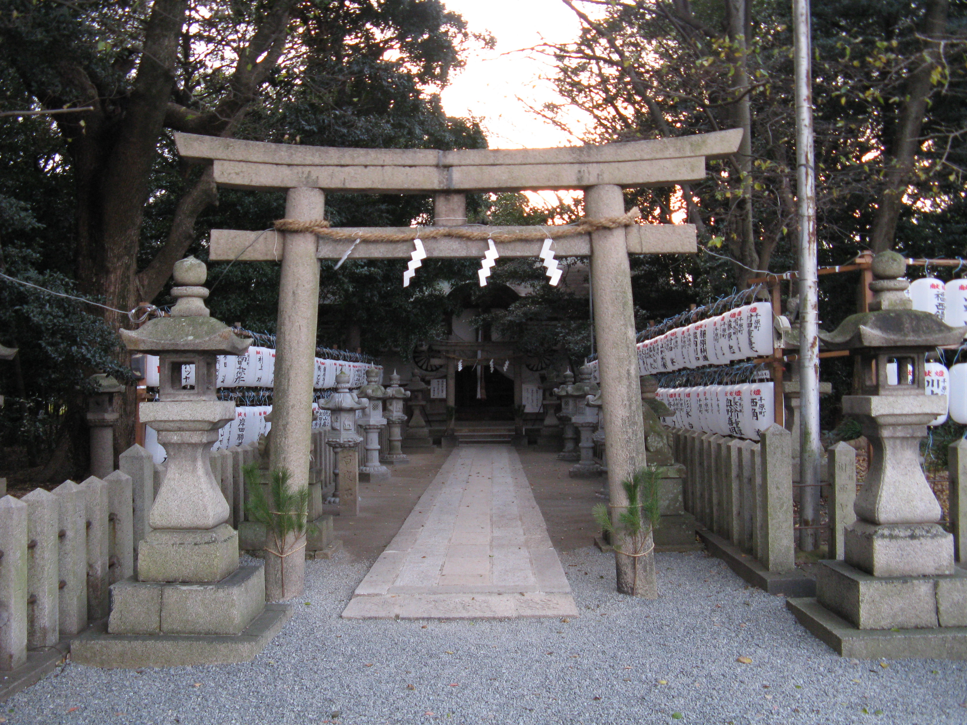 曽禰神社